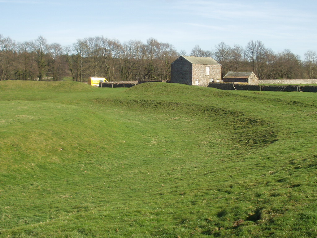 David Berry